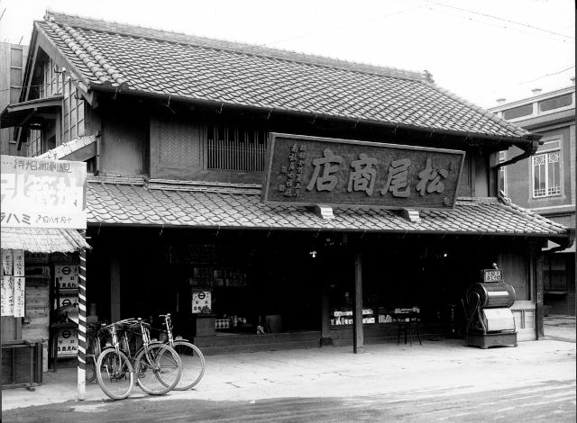 株式会社松尾の古い店舗の写真